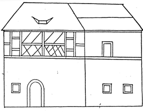 Schloss Hirschwald von 1737 nach einer Zeichnunf von Anton Dollacker 1928